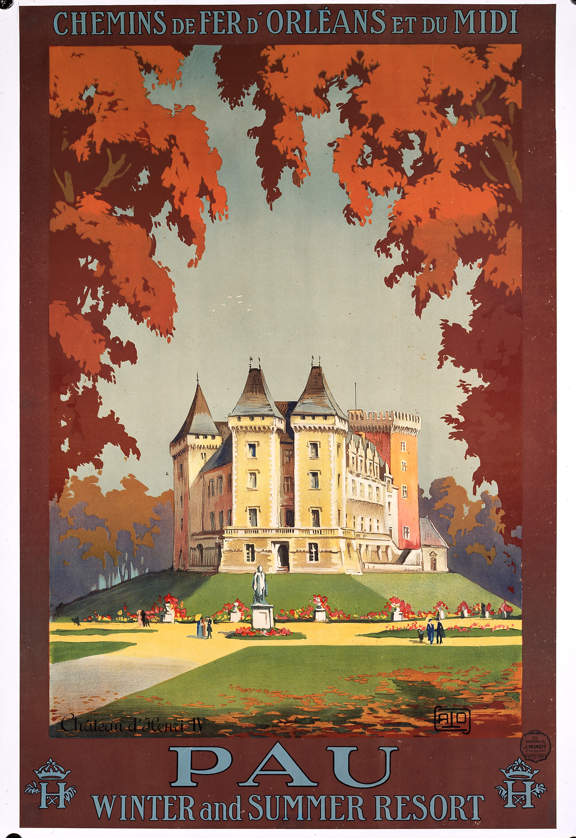 Affiche de Pau en anglais